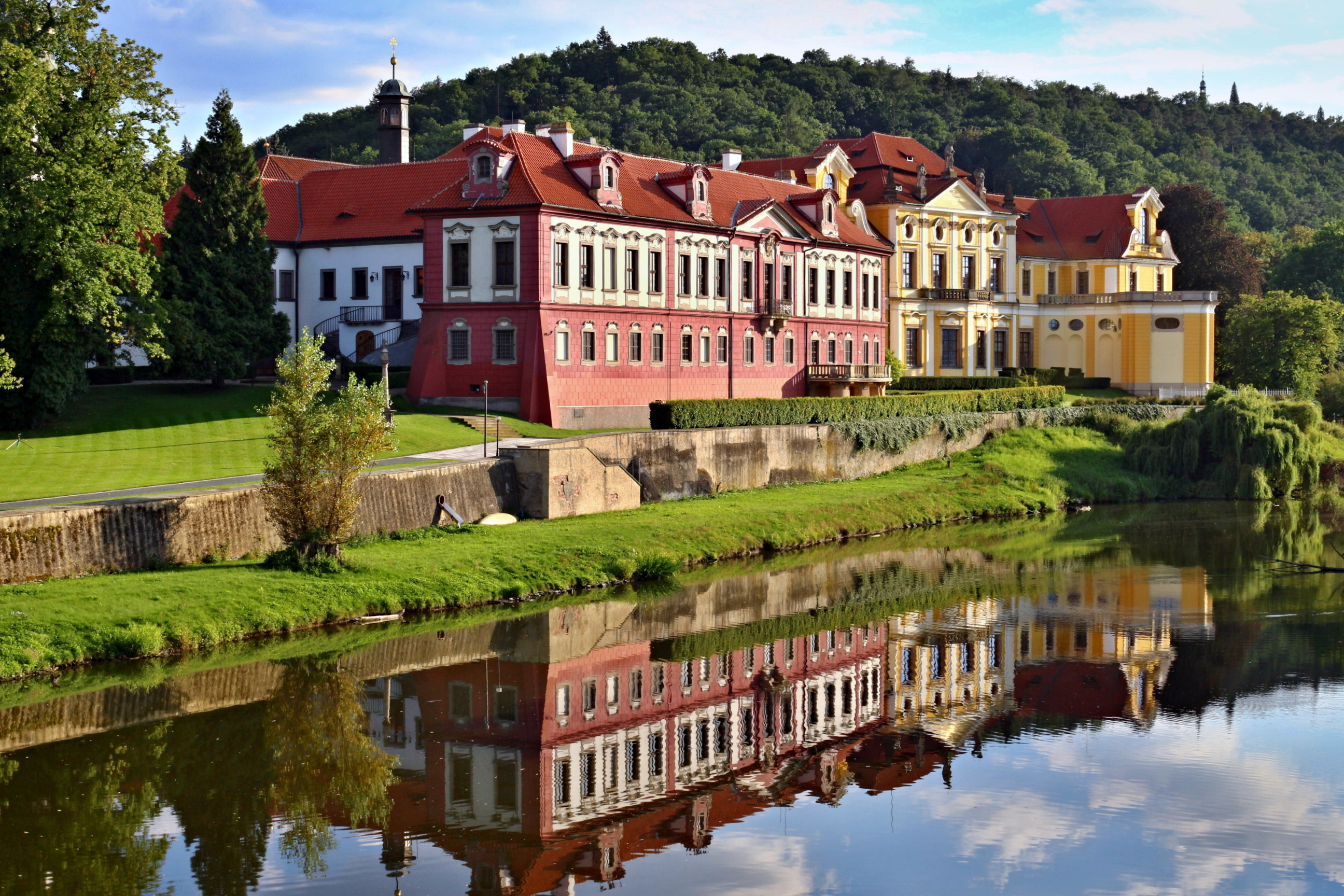 Zbraslavský klášter-zámek